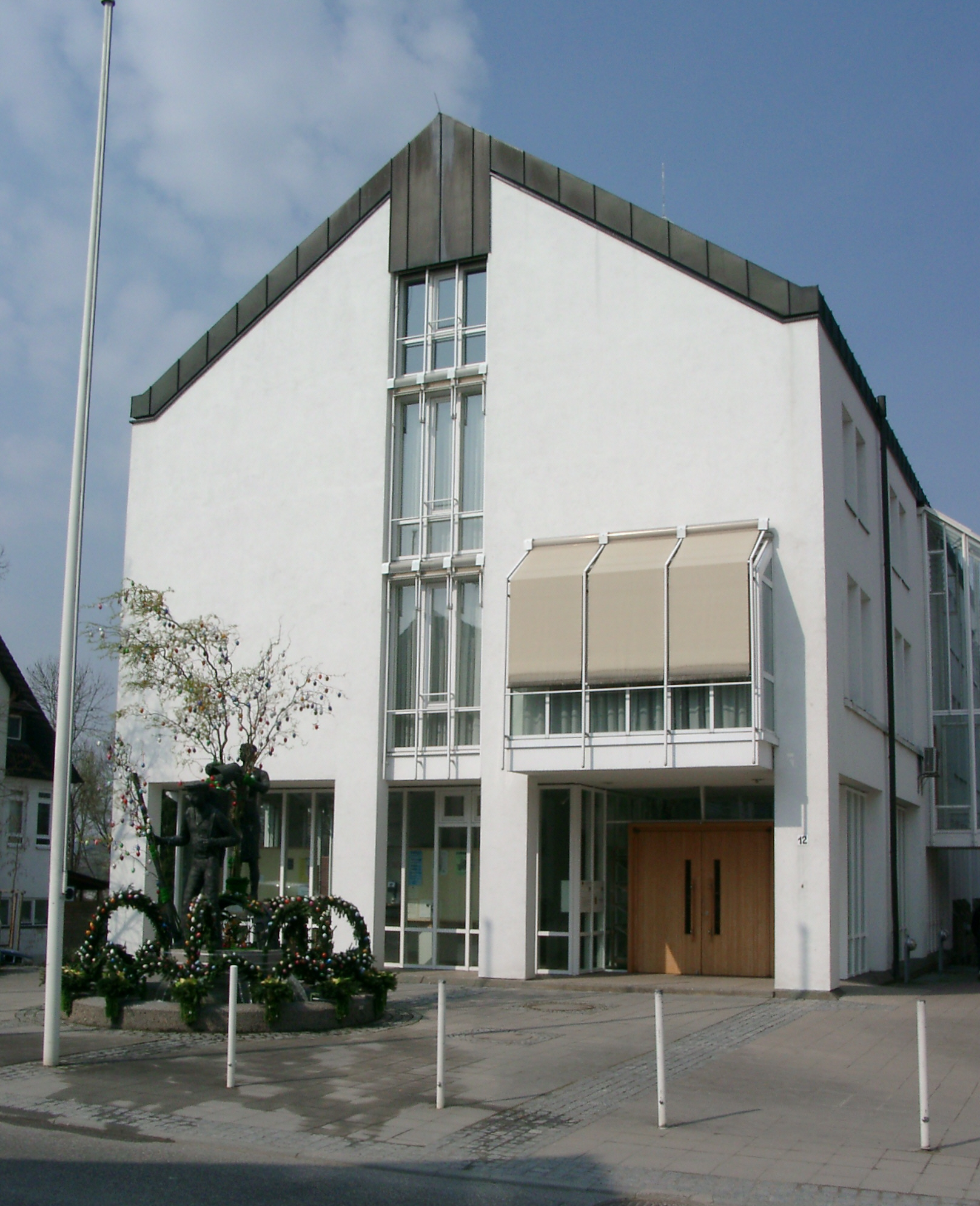 Bretzfeld, Rathaus